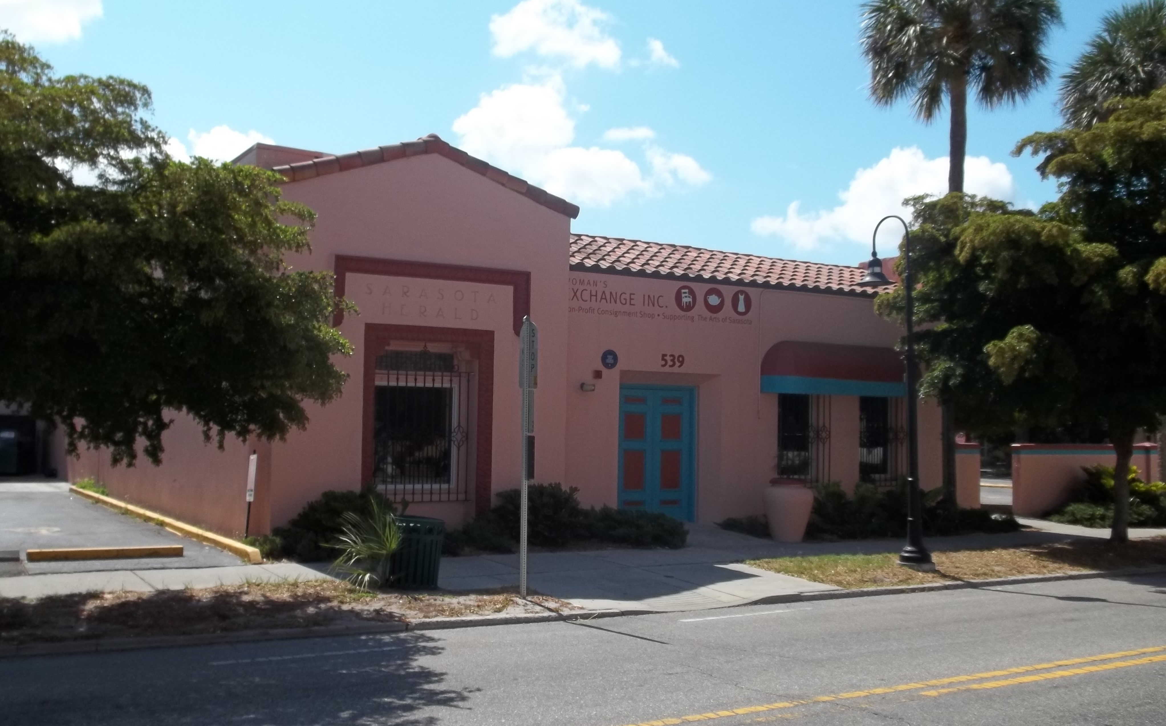 Sarasota, Florida: Sarasota Herald Building